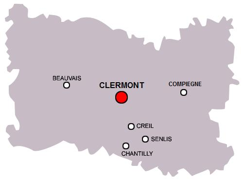 Localisation de clermont dans l'oise